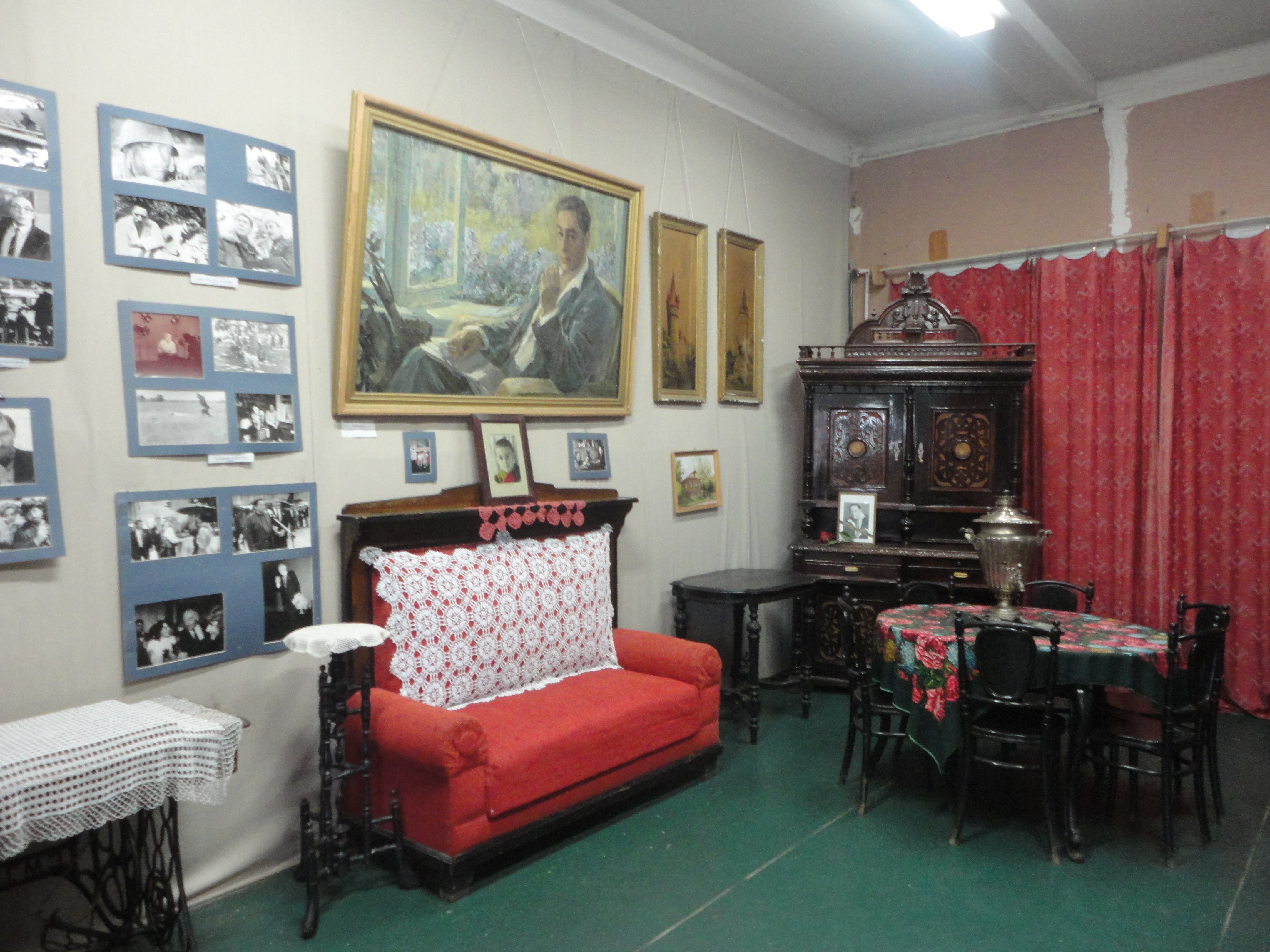 Павлово-посадский краеведческий музей: улица Большая Покровская, 38, Павловский Посад, Павлово-Посадский район, Московская область